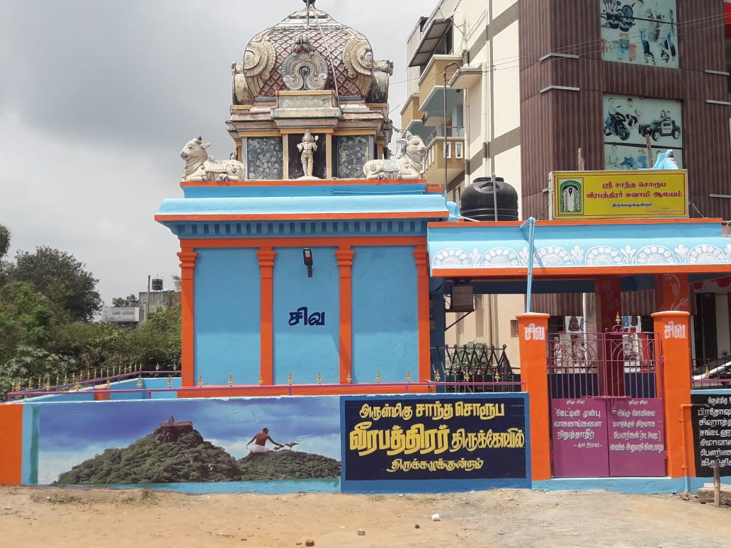 திருக்கழுக்குன்றம் சாந்த சொரூப வீரபத்திரர்.